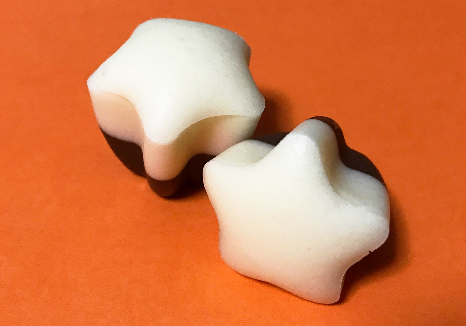 カプリコのあたま（星型のミルク味）